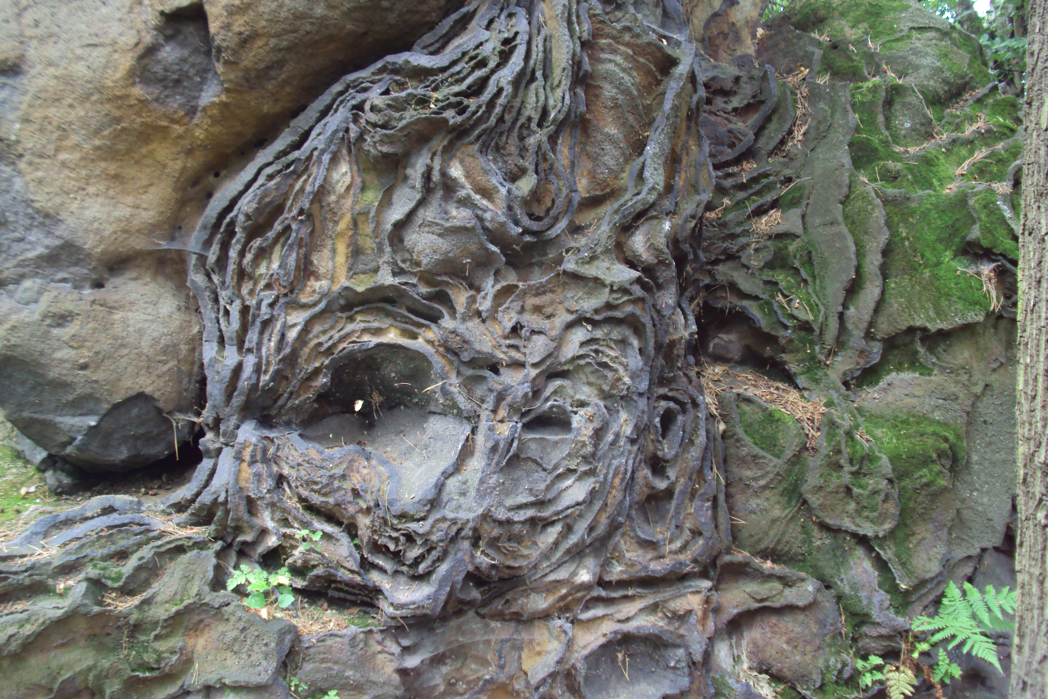 Přírodní památka Kokořínska